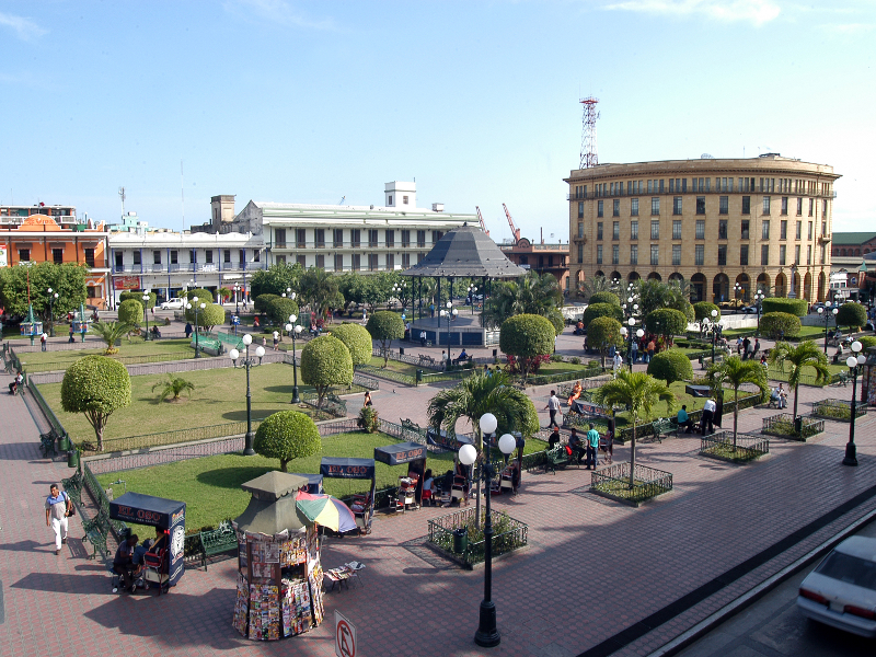 Tampico, Centro Historico